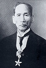 農学博士鈴木梅太郎 (1874 – 1943)